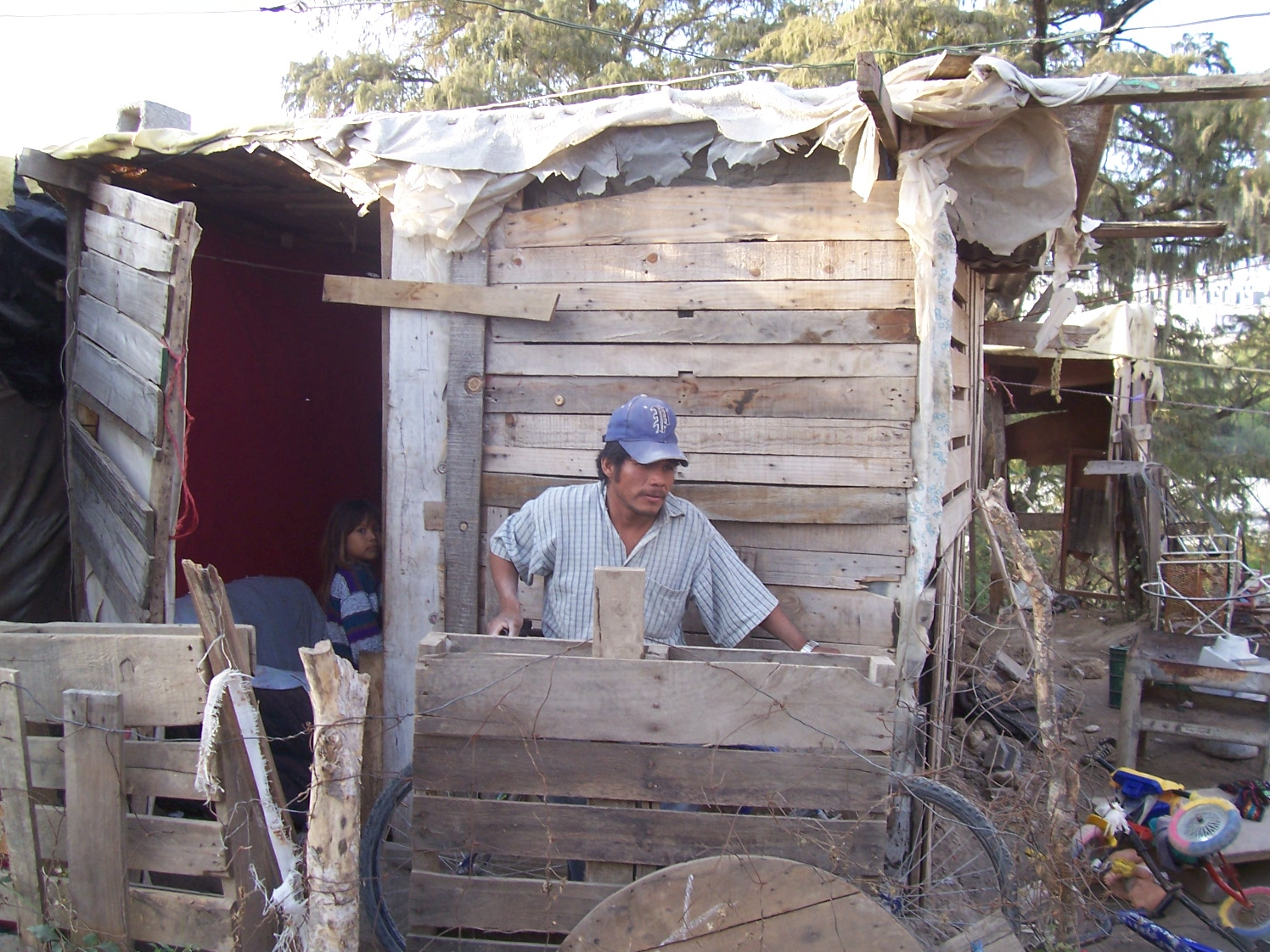 Asentamiento marginado "Colinas del Río", en el municipio Benito Juárez del Estado de Nuevo León en México. Diciembre de 2005. Fotografía tomada por usuario LeCire Marginalized settlement "Colinas del Río", in the municipality Benito Juárez of the State of Nuevo León in Mexico. December of 2005. Photography taken by user LeCire